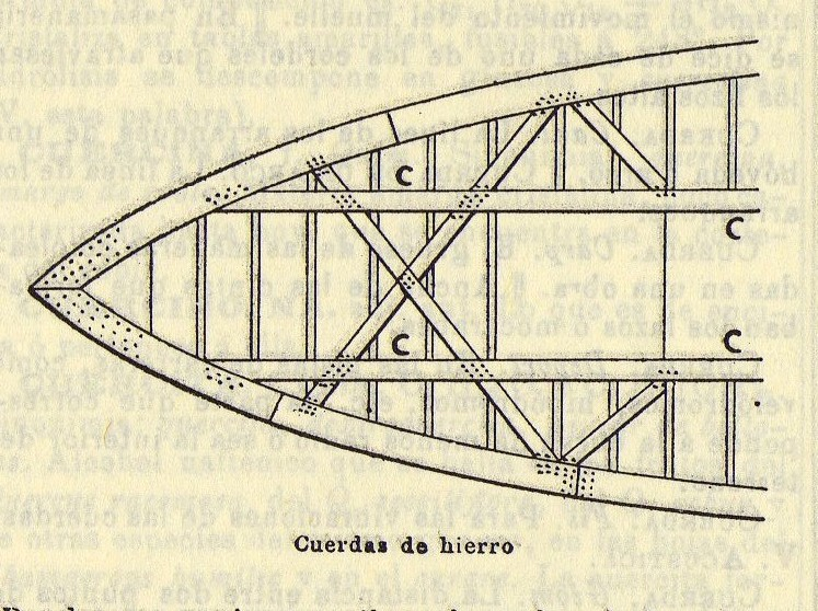 Cuerdas de hierro de un barco. Vista cenital.